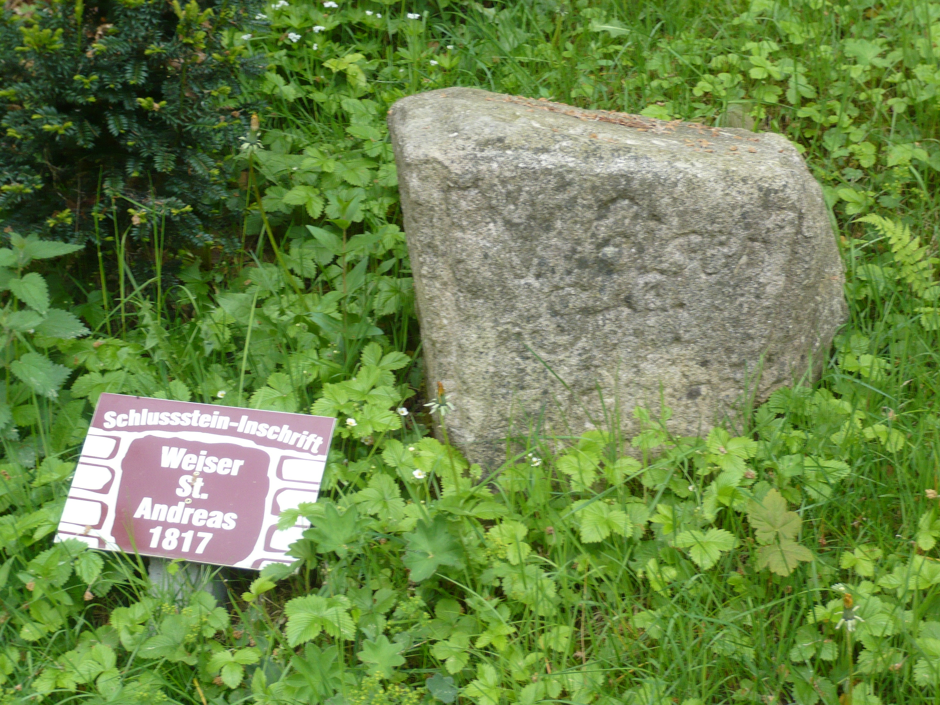 Stadt Aue, Weißerdenzeche: Schlussstein